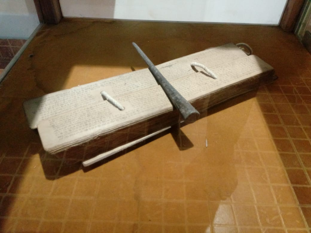 Copy of Ezhuthachan's Adhyathma ramayanam Kilippattu. Palm leaf manuscript preserved at Thunchan parambu, Tirur